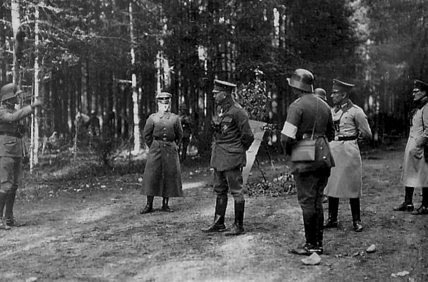 Rüdiger von der Goltz suomessa vuonna 1918, Goltz kuvassa keskellä.